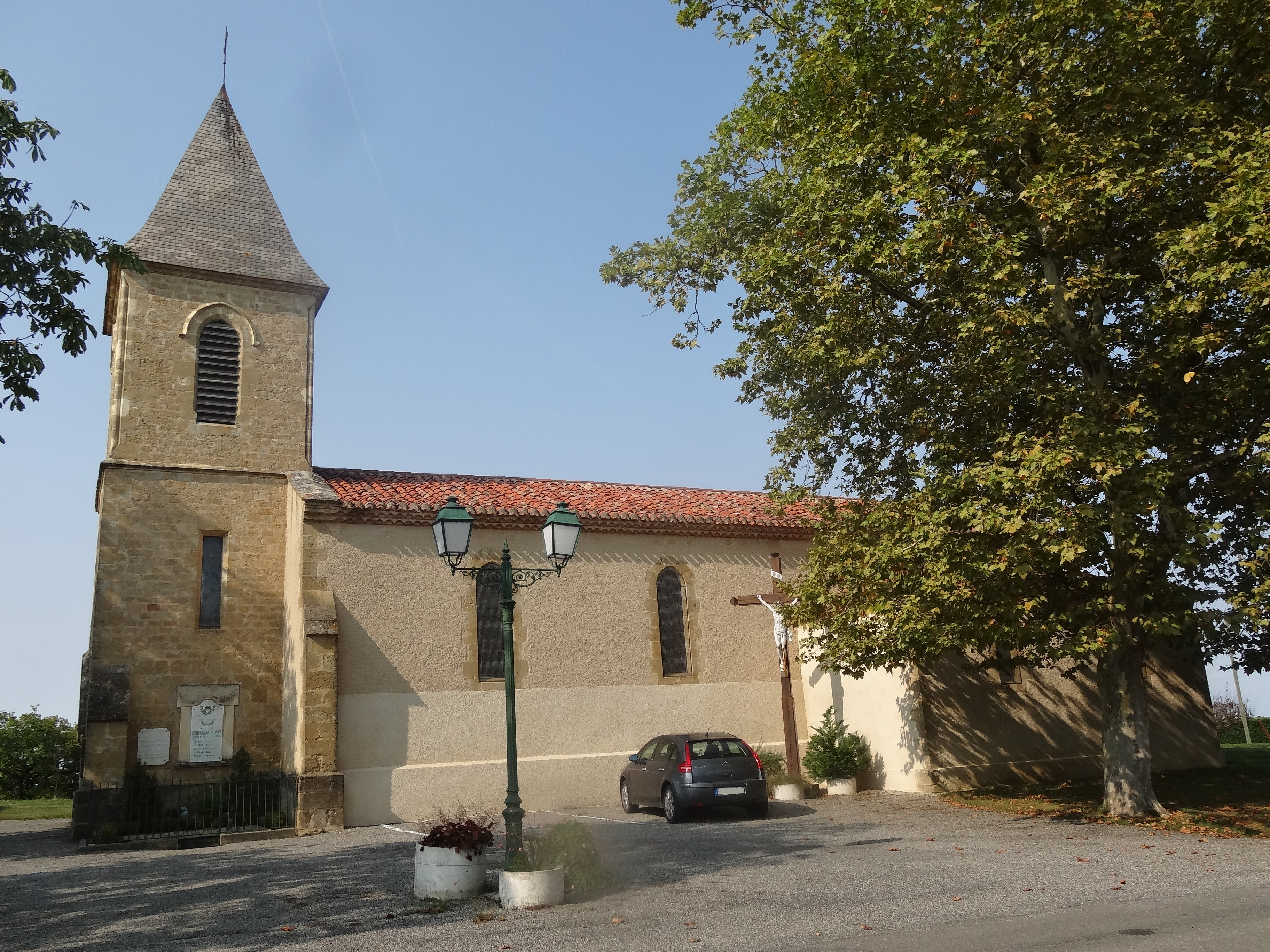 Face sud de l'église Saint-Barthélémy de Monferran.